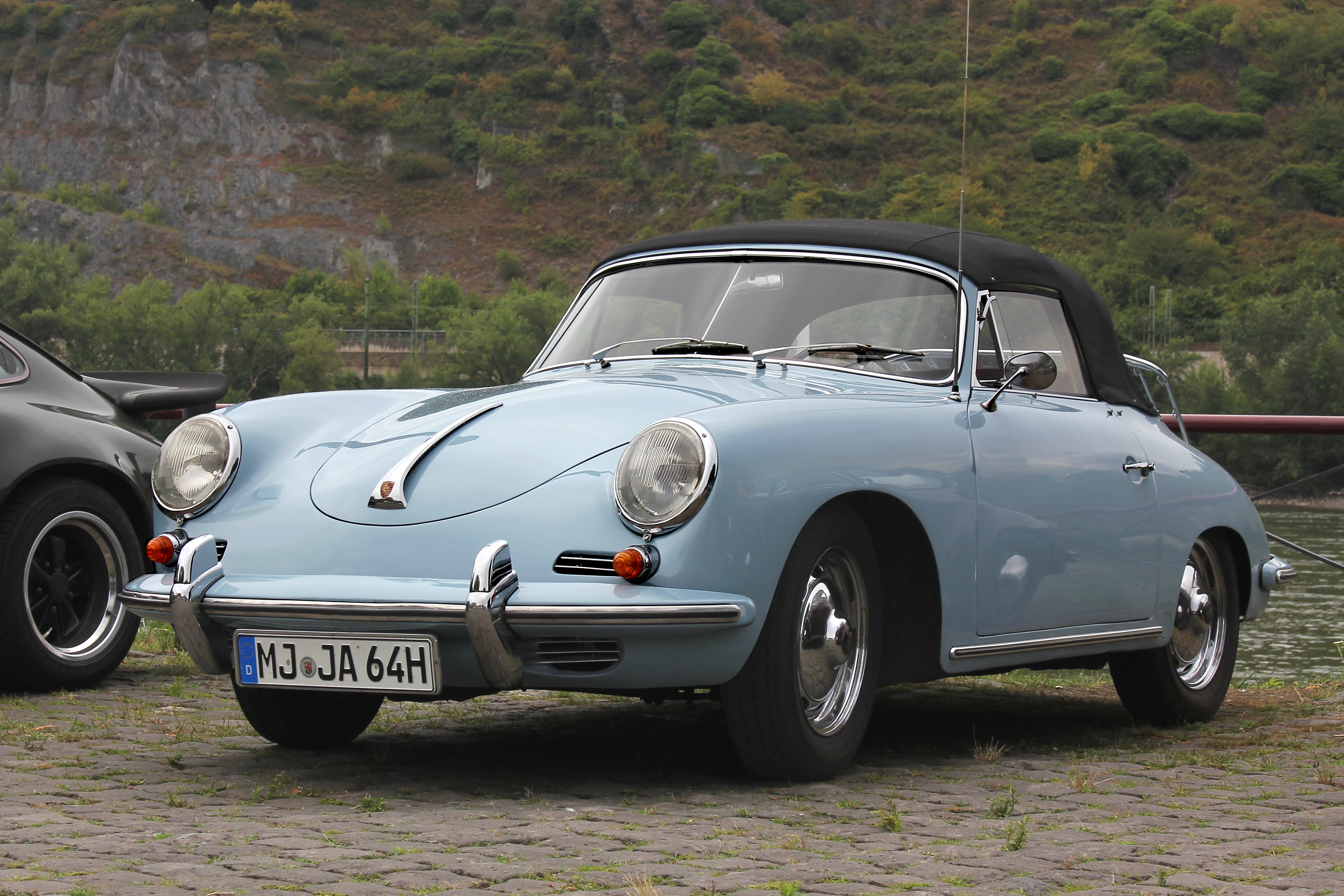 Porsche 356 B 1600 Super Cabriolet, 4-Zylinder-Boxermotor, 1582 cm³, 75 PS bei 5000/min, Radstand 2100 mm, Länge 4010 mm (Kennzeichen verändert)